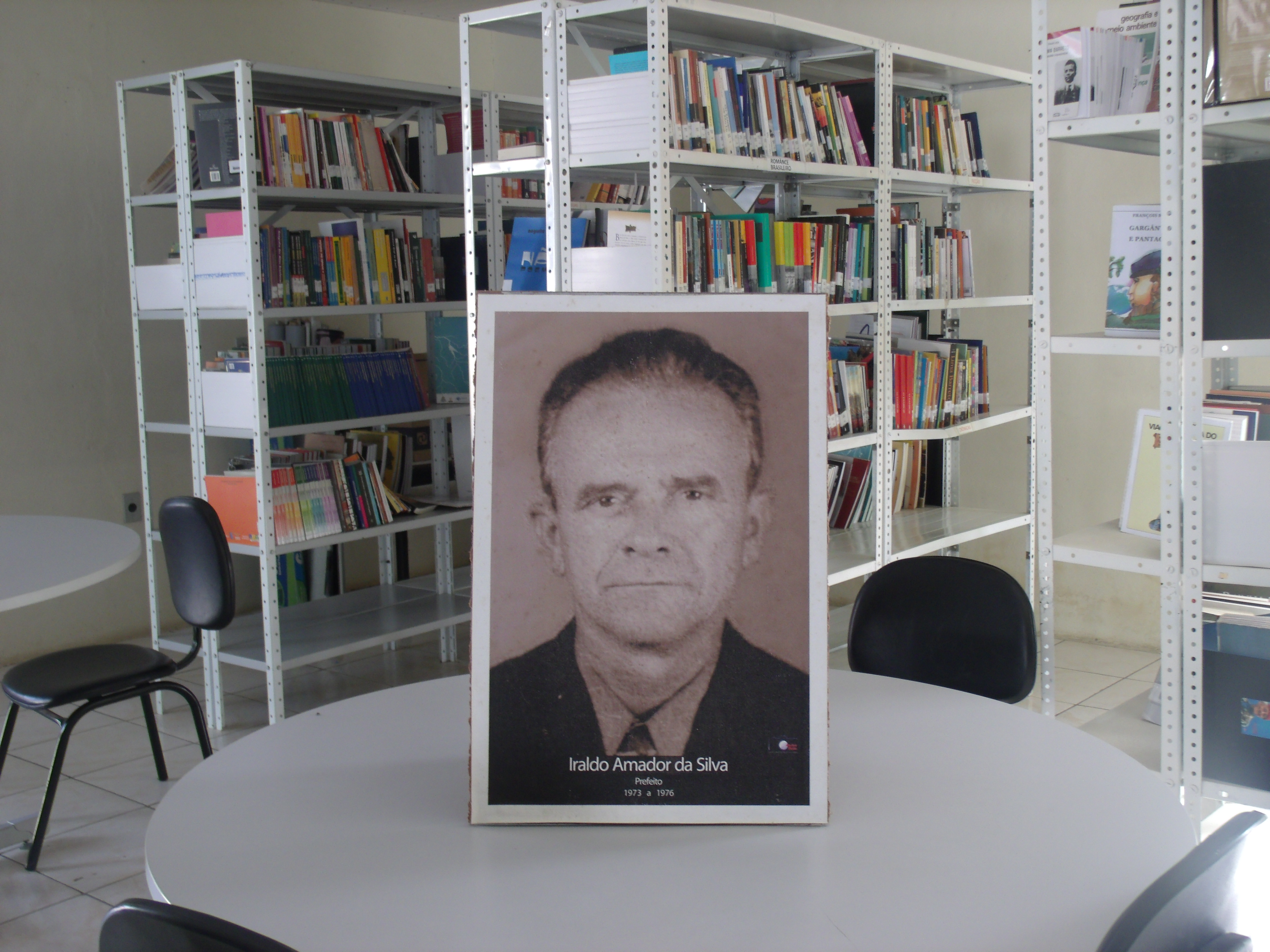 Exposição dos prefeitos de Alcâtaras na bilioteca municipal. Aí é o a foto do ex-prefeito Irado Amador da Silva de 1976.